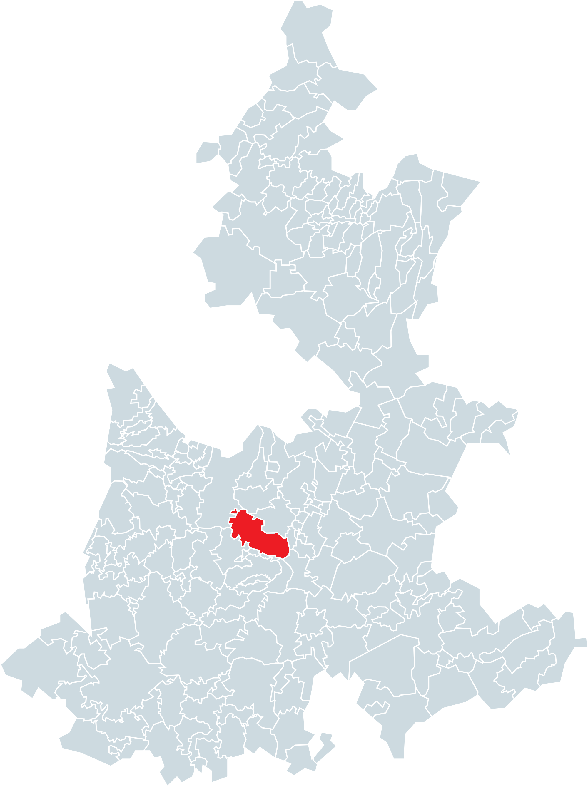 Municipio de Tzicatlacoyan